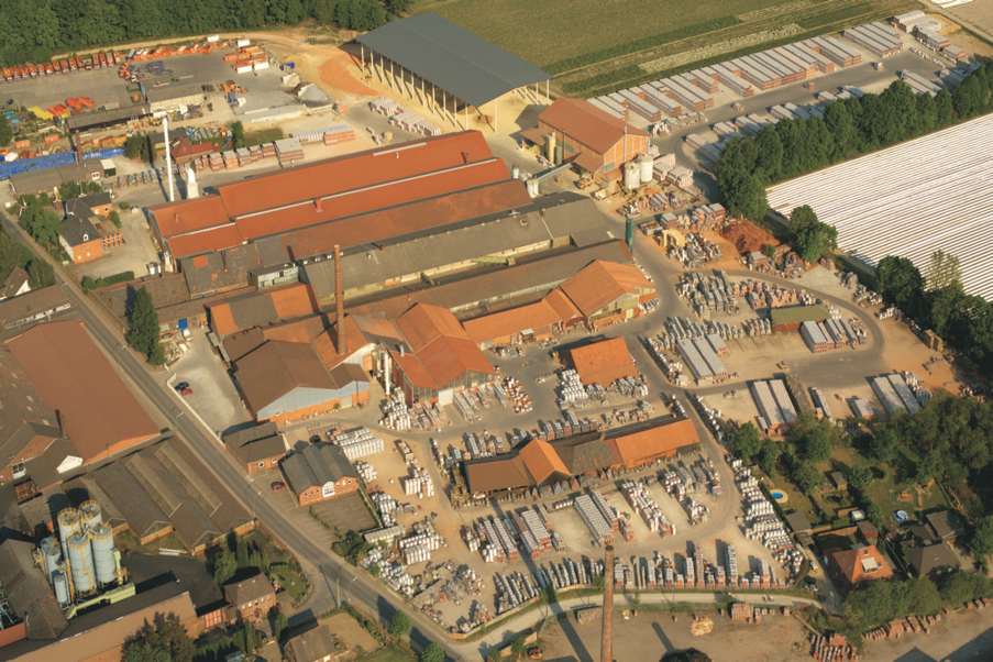 Aktuelle Luftaufnahme des Laumans Firmengeländes